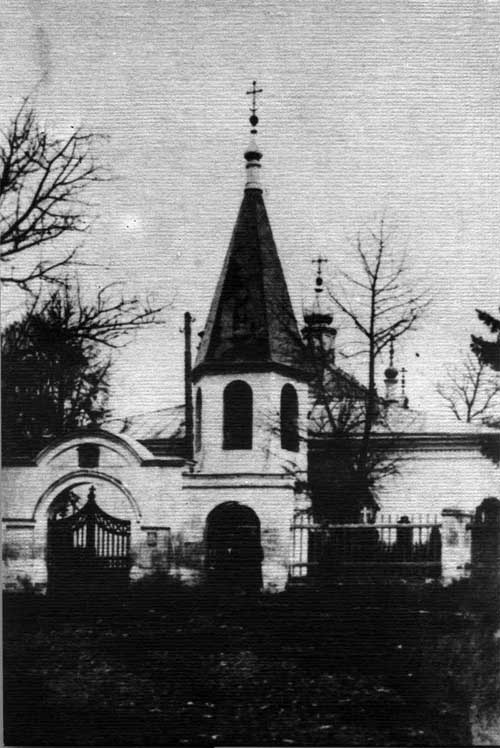 Воскресенская ул., церковь Воскресения Христово, 1728